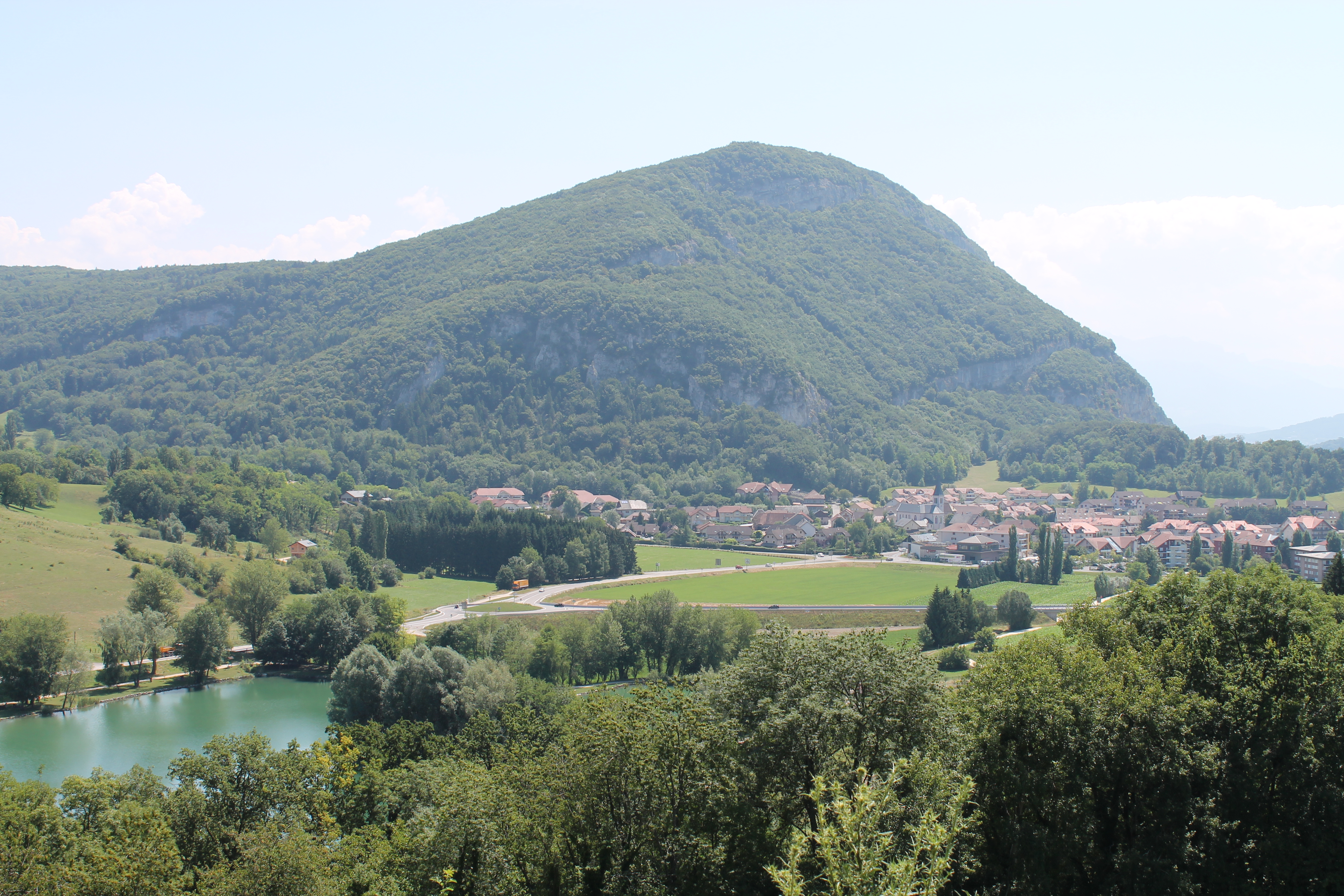 Vue de La Balme-de-Sillingy depuis le hameau de La Bâtie. Au premier plan, le plan d'eau